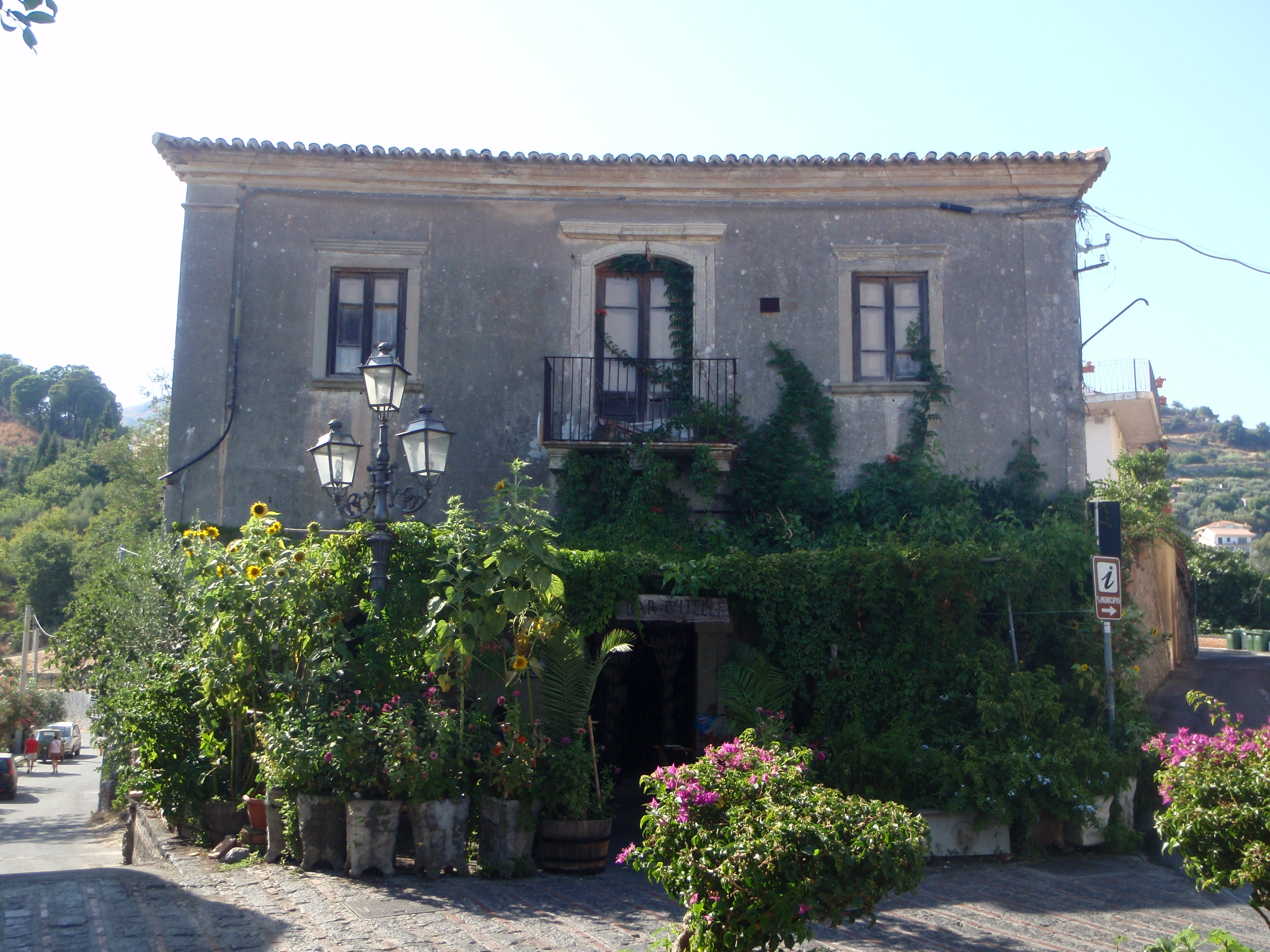 Savoca, Coppola 1972., Bar Vitelli